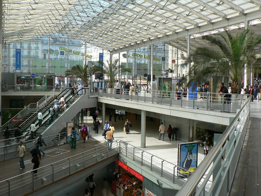 Gare du Nord Paris vue interieure coté banlieue